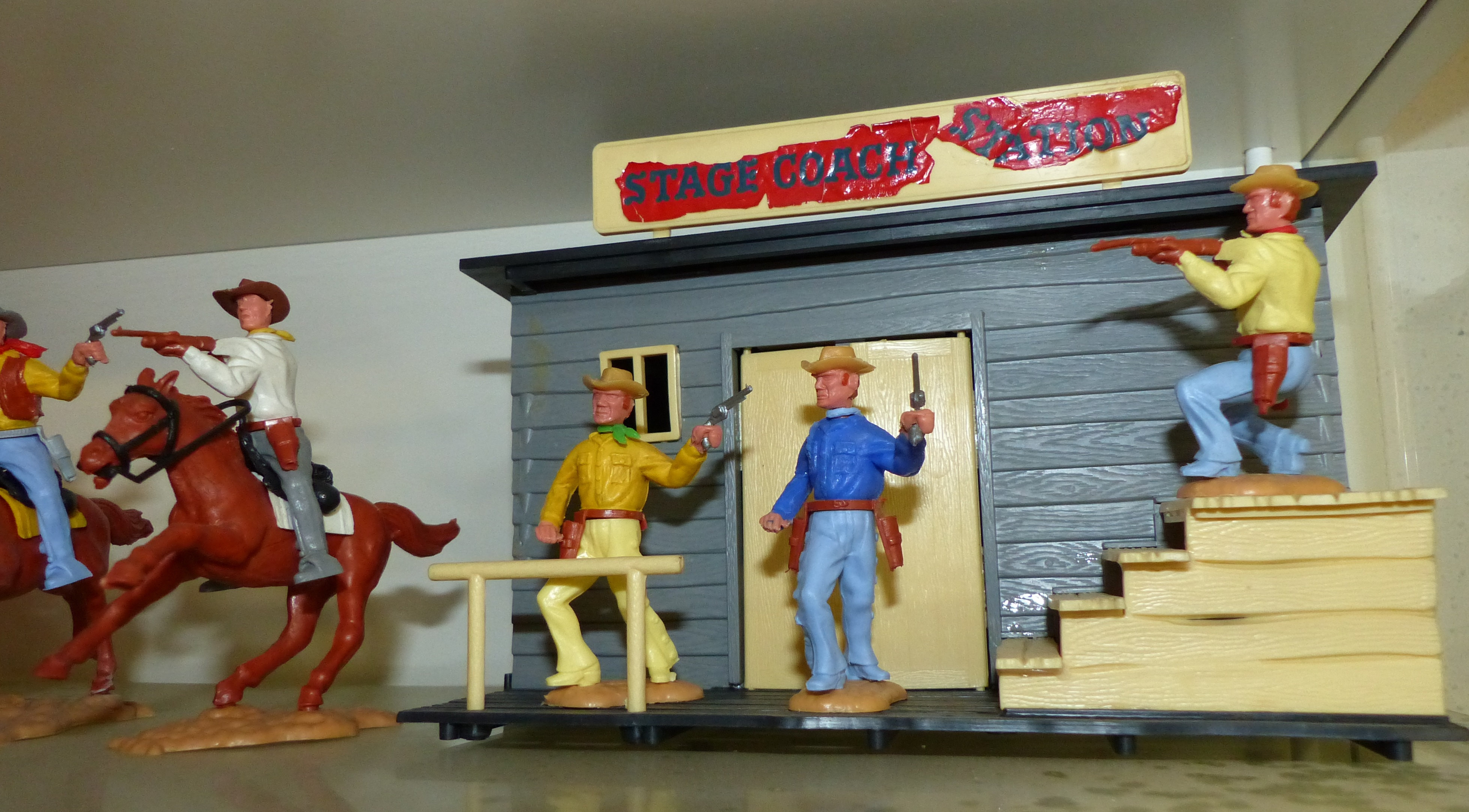 Kunststofffigur der Firma Timpo Toys